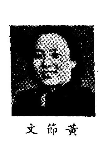 中文（中国大陆）: 制憲國民大會代表